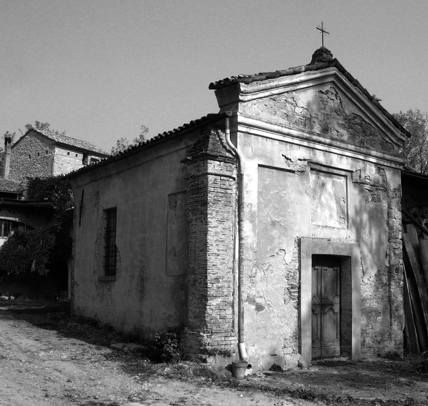 Oratorio della Madonna Addolorata, Case Gazzoli (Pianello V.T., PC)